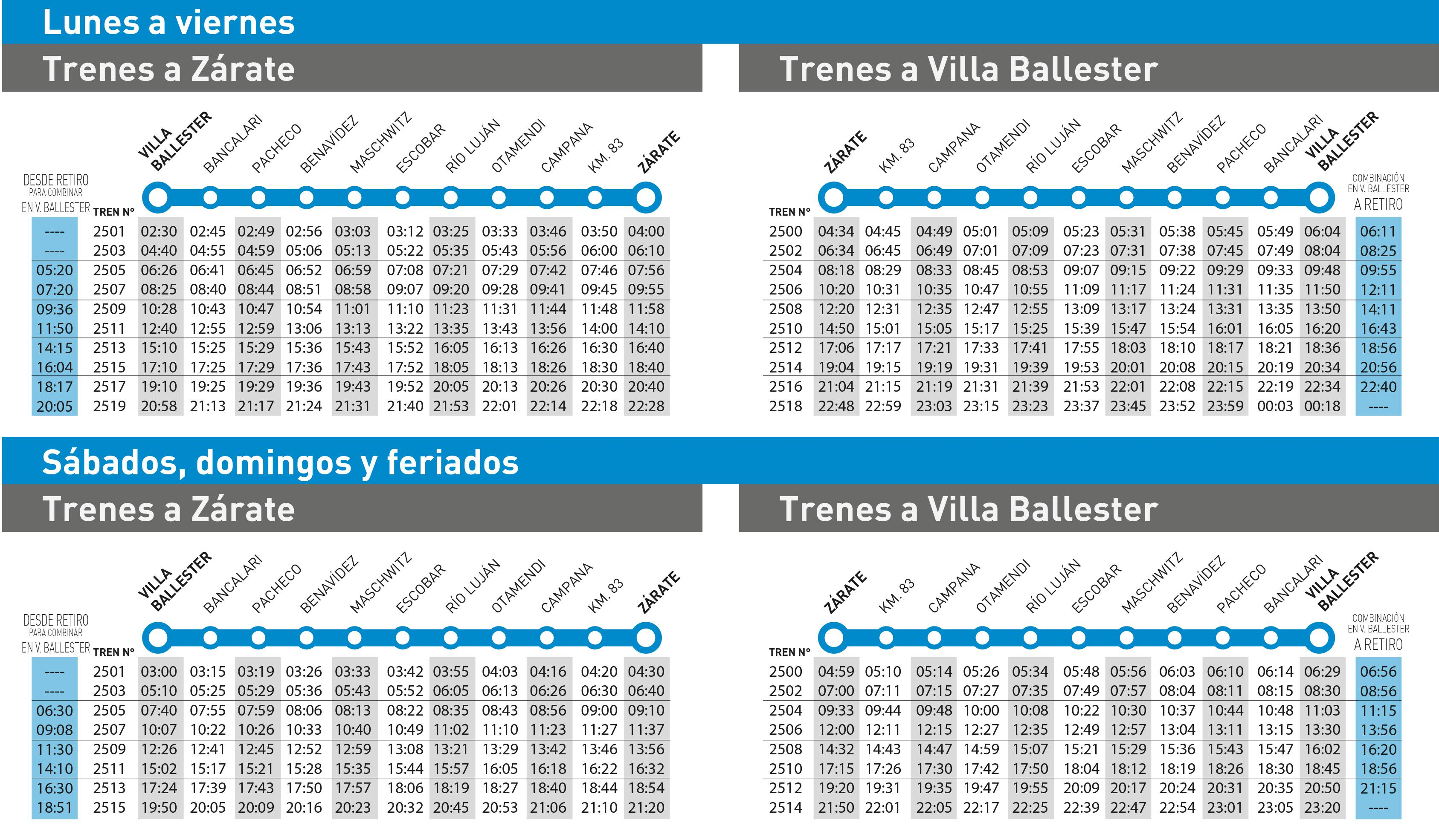 Horarios al publico del servicio del tren